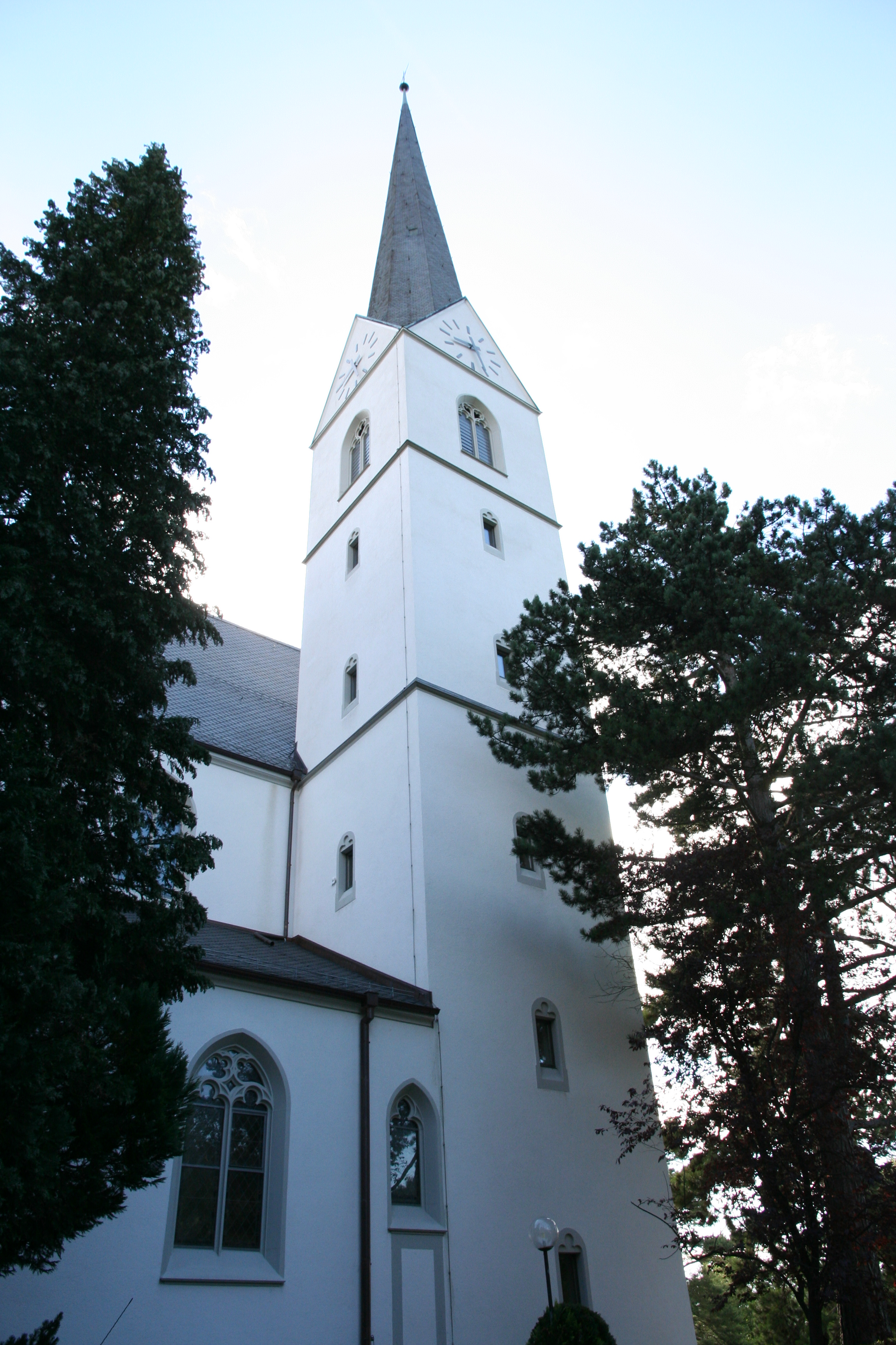 Römisch-katholische Pfarrkirche Hl. Dreifaltigkeit Adliswil, Turm